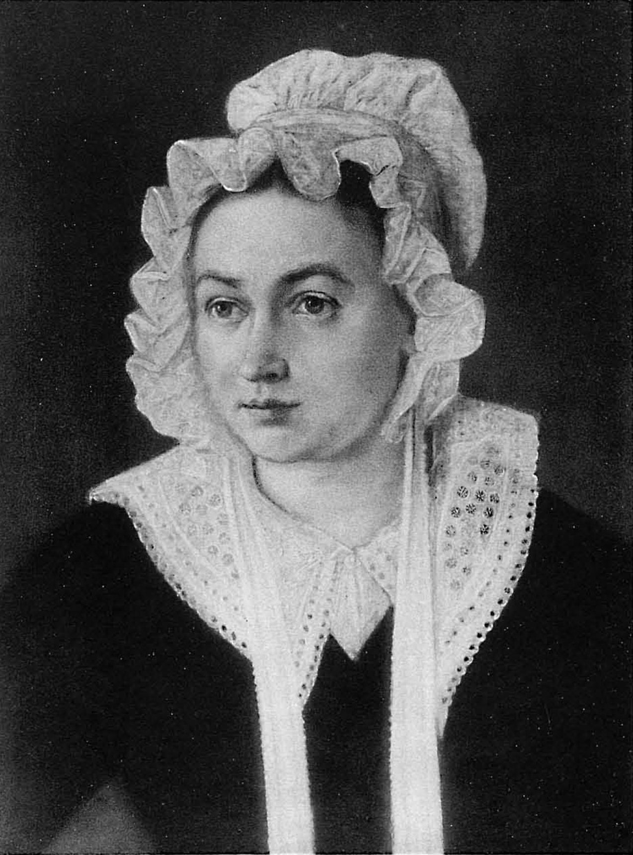 Наталья Дмитриевна Фонвизина (1803-1869)